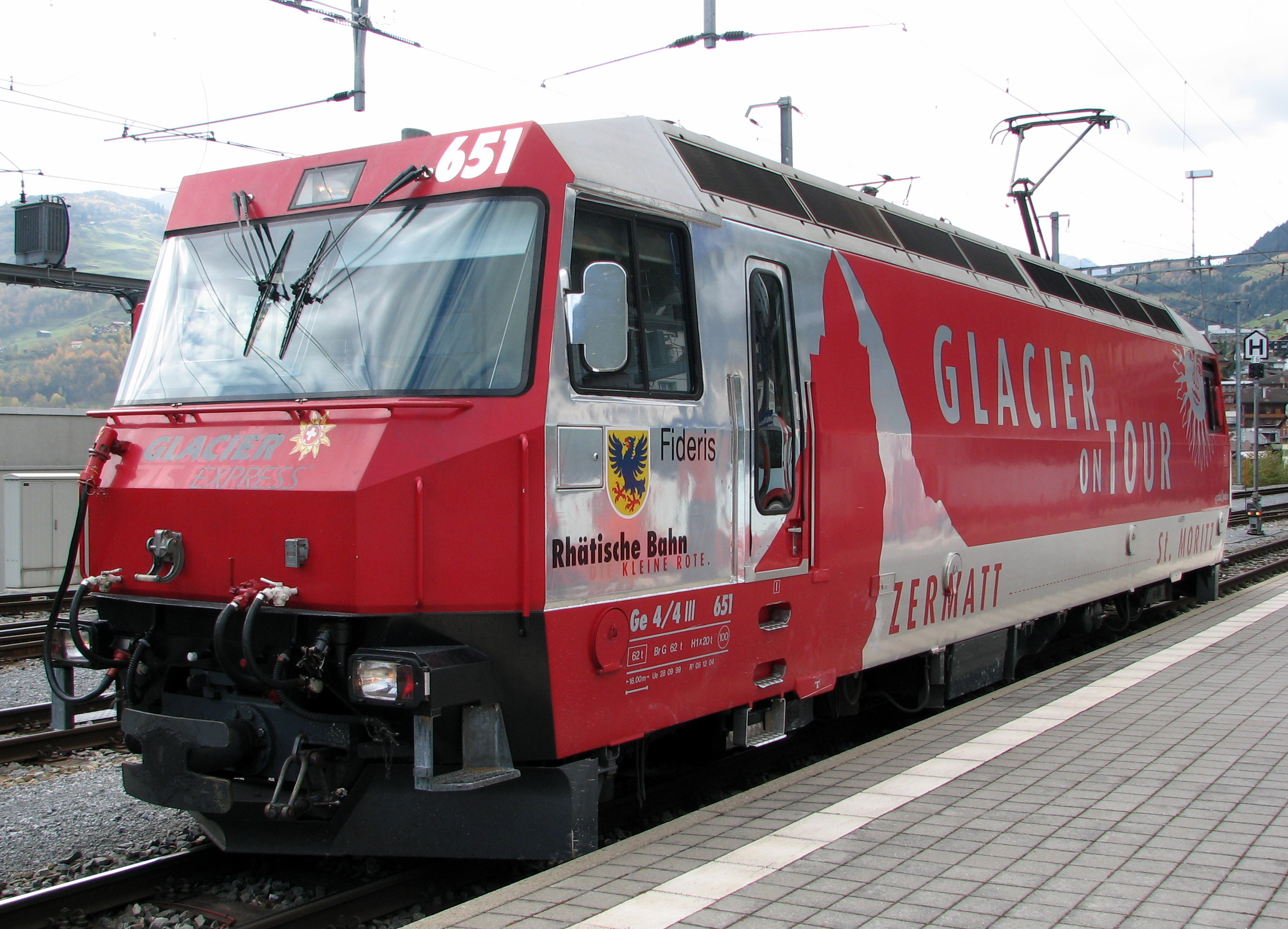 Lokomotive Ge 4/4 III 651 der Rhätischen Bahn im Bahnhof Disentis